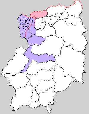 奈良県宇智郡の町村制時点の町村。